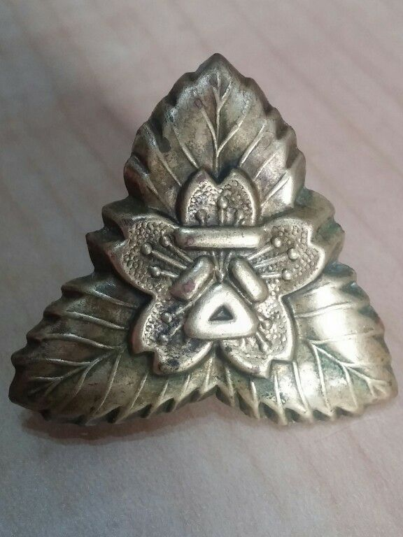 桃園第一公學校銅質帽徽